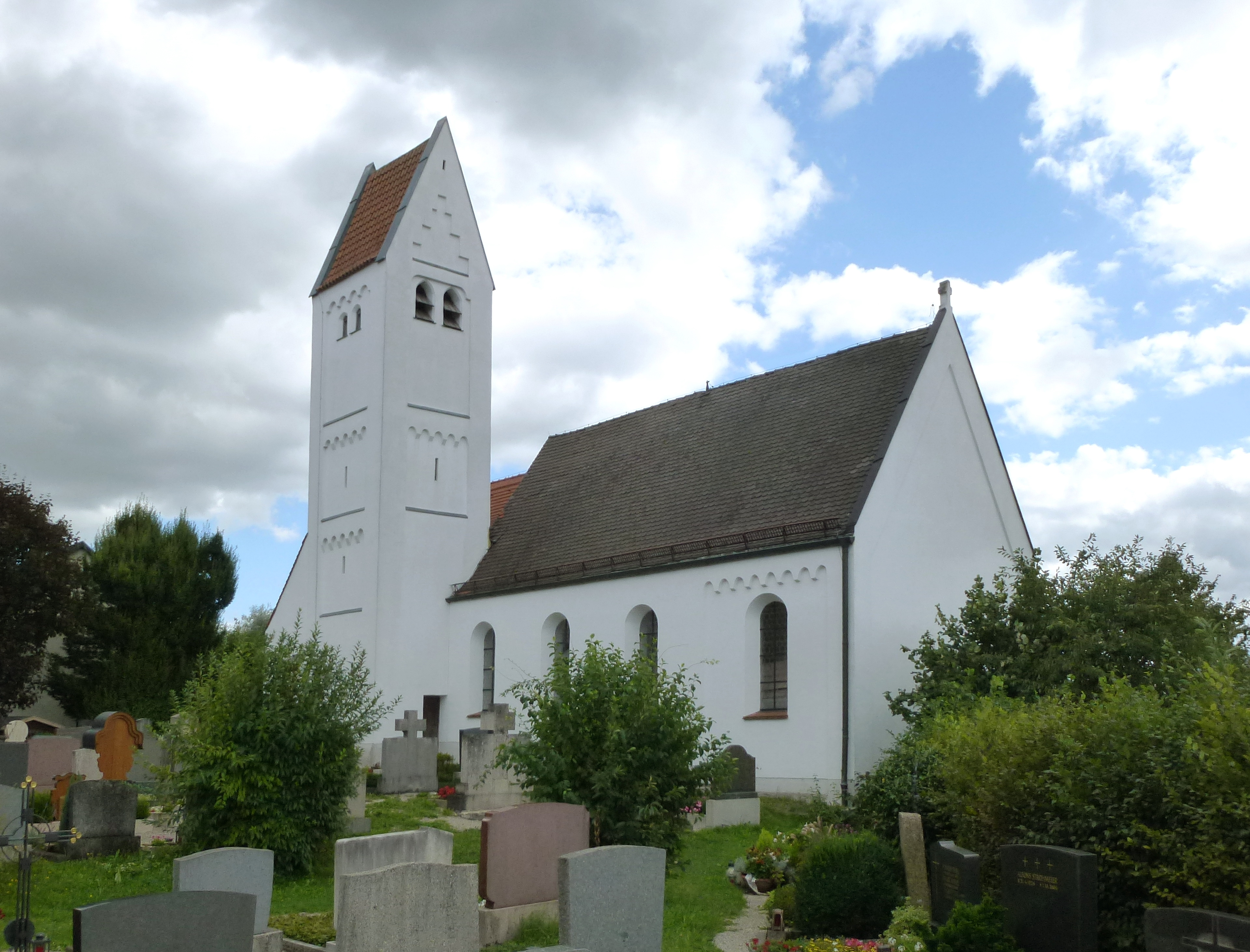 Hebertshausen, Am Kirchberg 12: Alte katholische Pfarrkirche St. Georg. Romanisch, älteste urkundliche Erwähnung 1292. Ansicht von NW